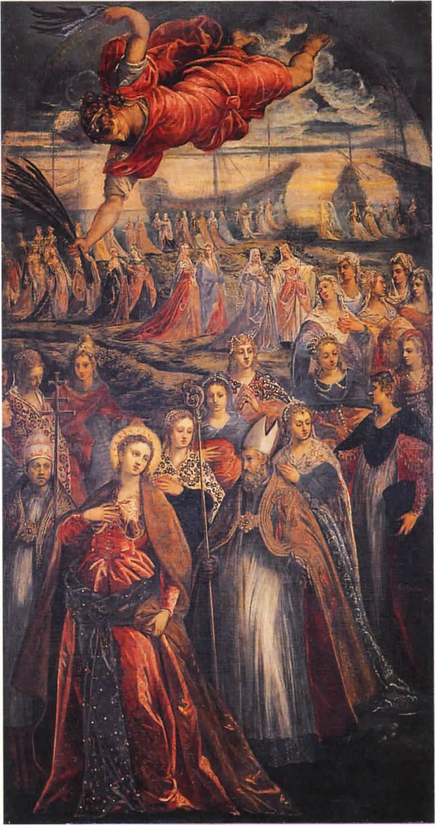 Sant'Orsola e le Vergini dipinto di Tintoretto e bottega già nella chiesa degli incurabili